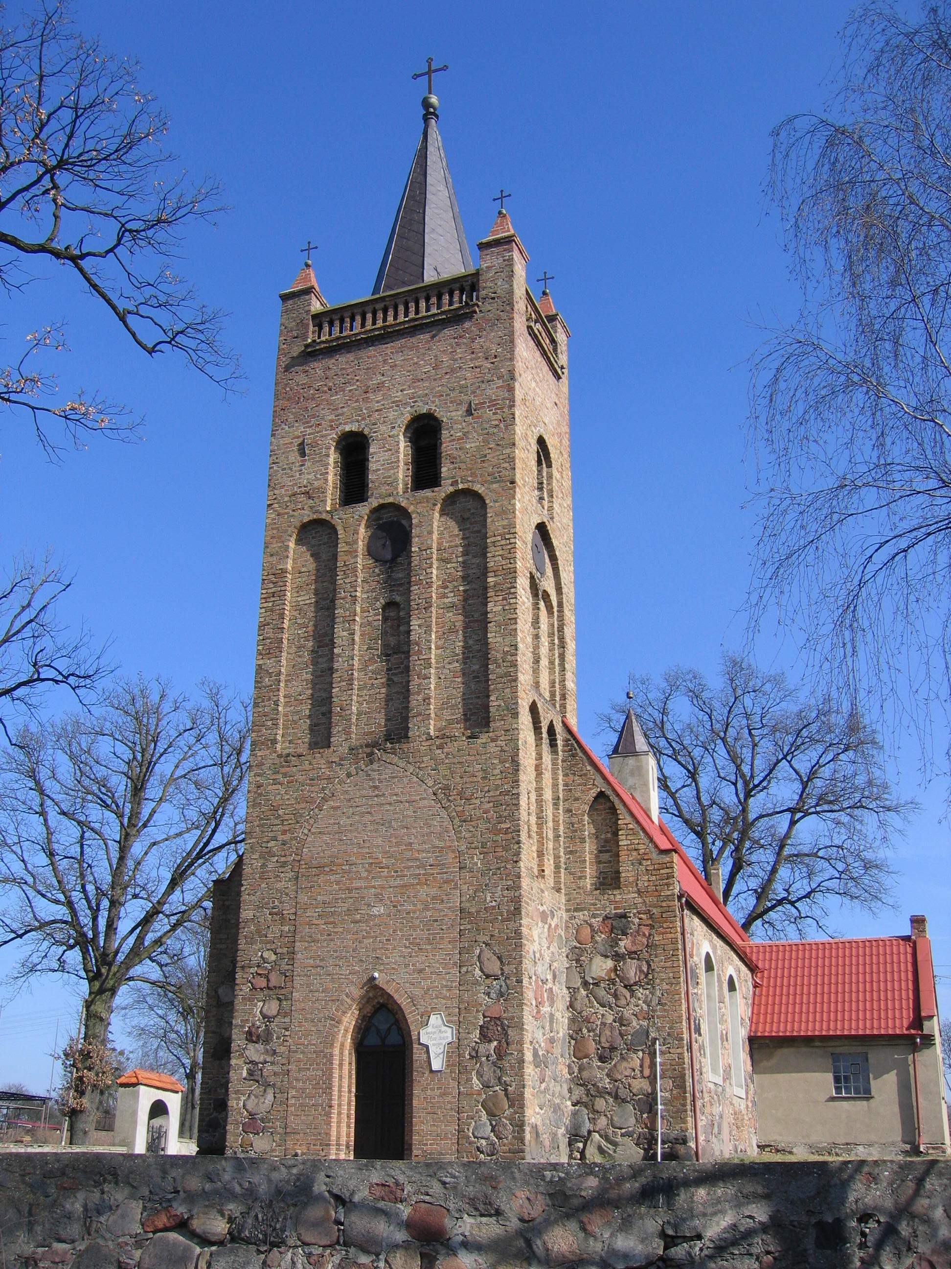 Chojna Barnkowo - kościół p.w. św. Marka